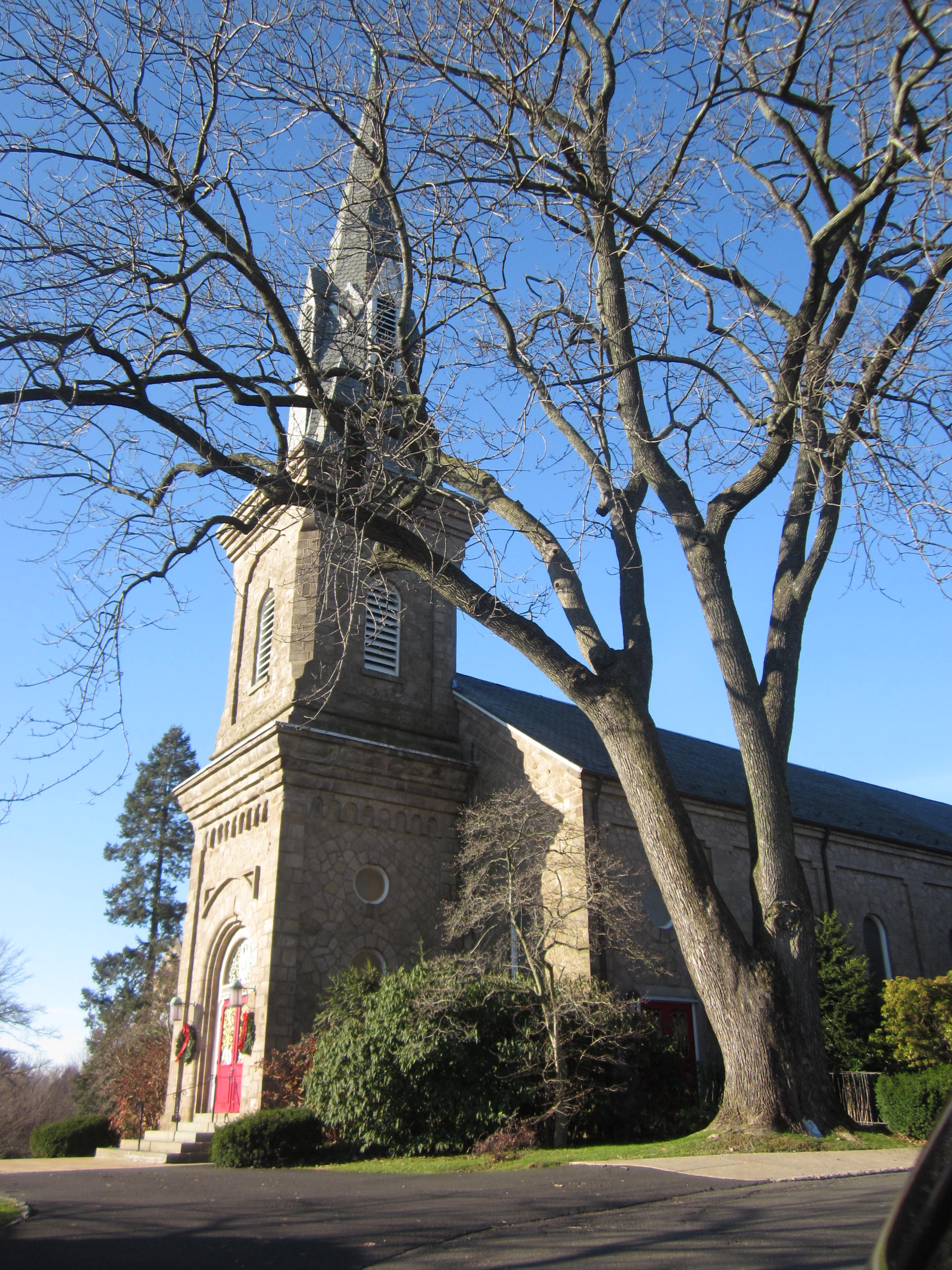 Abington, Pennsylvania